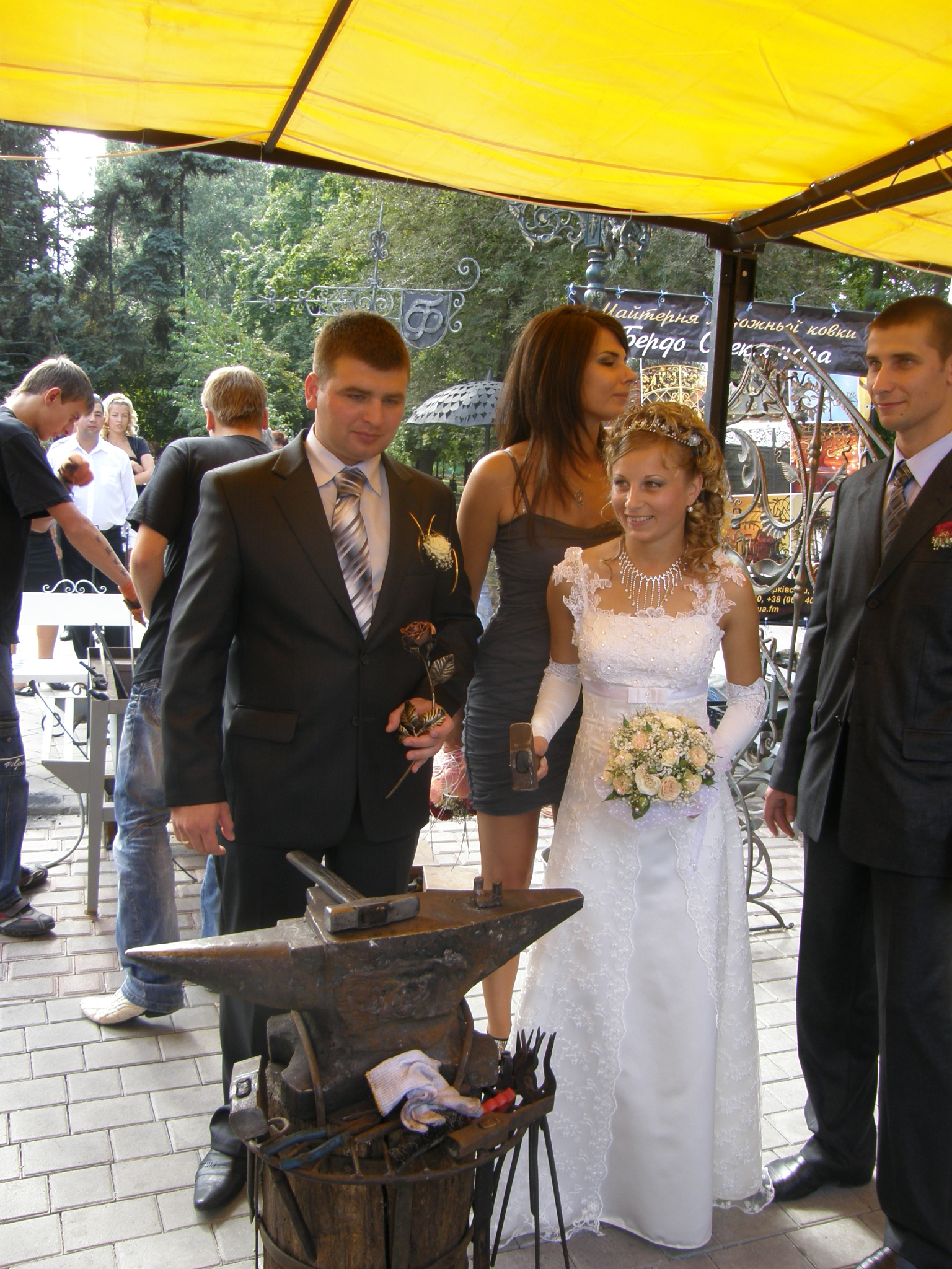 12 международный кузнечный фестиваль в Донецке